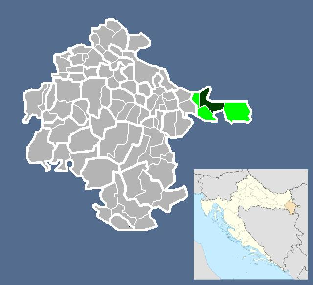 Српски (ћирилица): Насеље Шаренград у саставу Града Илока.